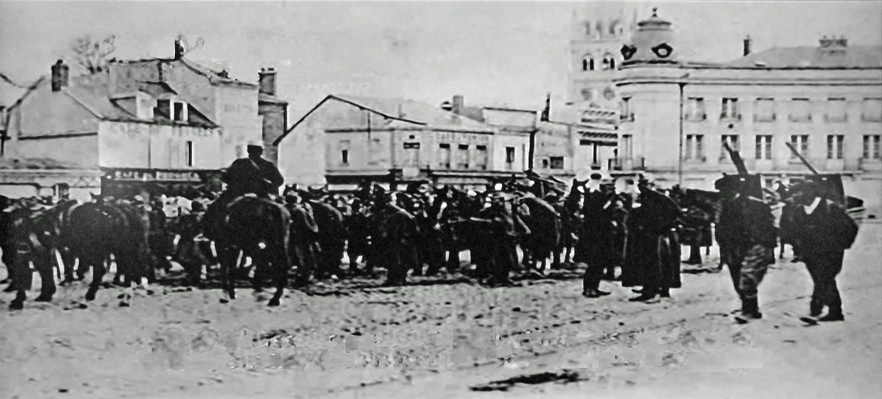 la troupe a été mobilisée pour répondre à la révolte des paysans en Champagne .